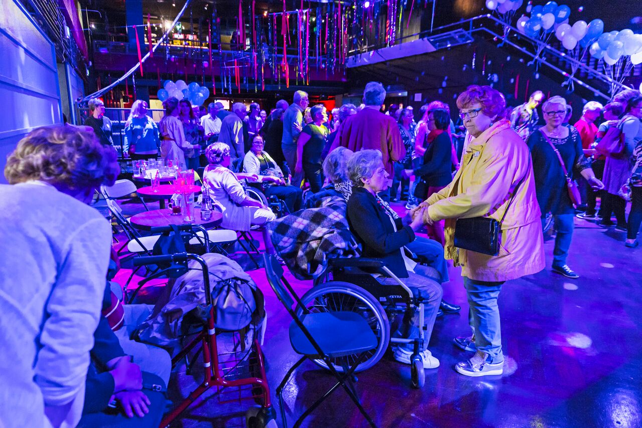 Mummodisko Tavastialla 2017